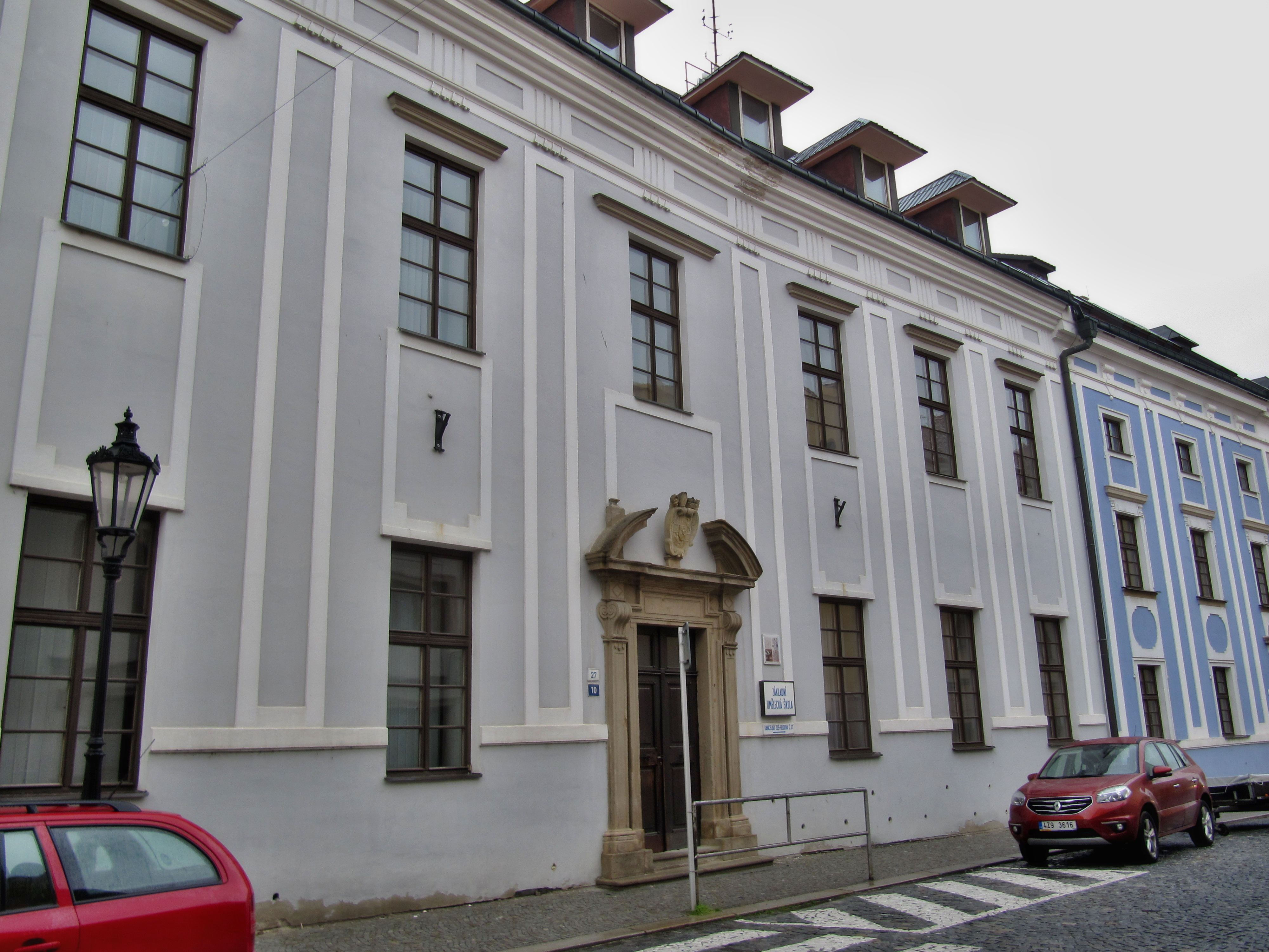 Chlapecký zpěvácký seminář (Kroměříž), Jánská, Pilařova 27/10, Kroměříž